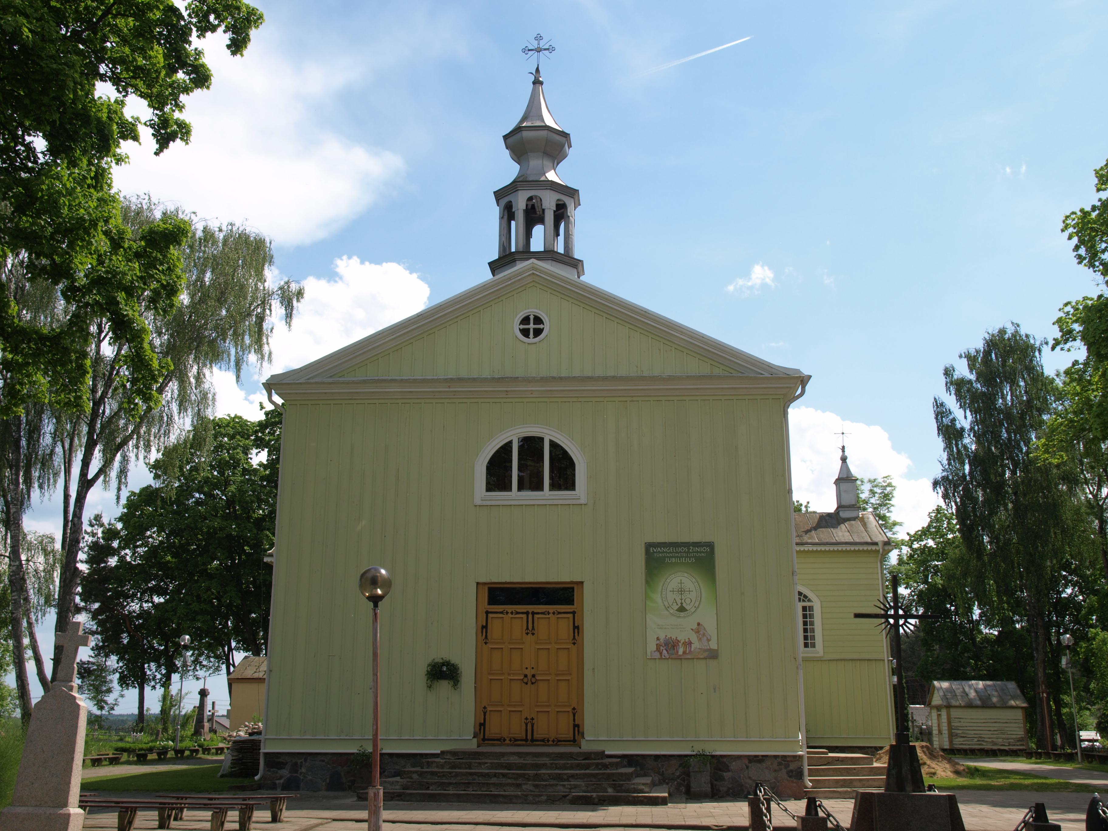 Alytaus šv. Angelų Sargų bažnyčia, Alytus, Lietuva